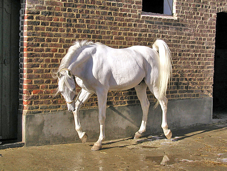 asil Arabian stallion VASHARA CHAMAL